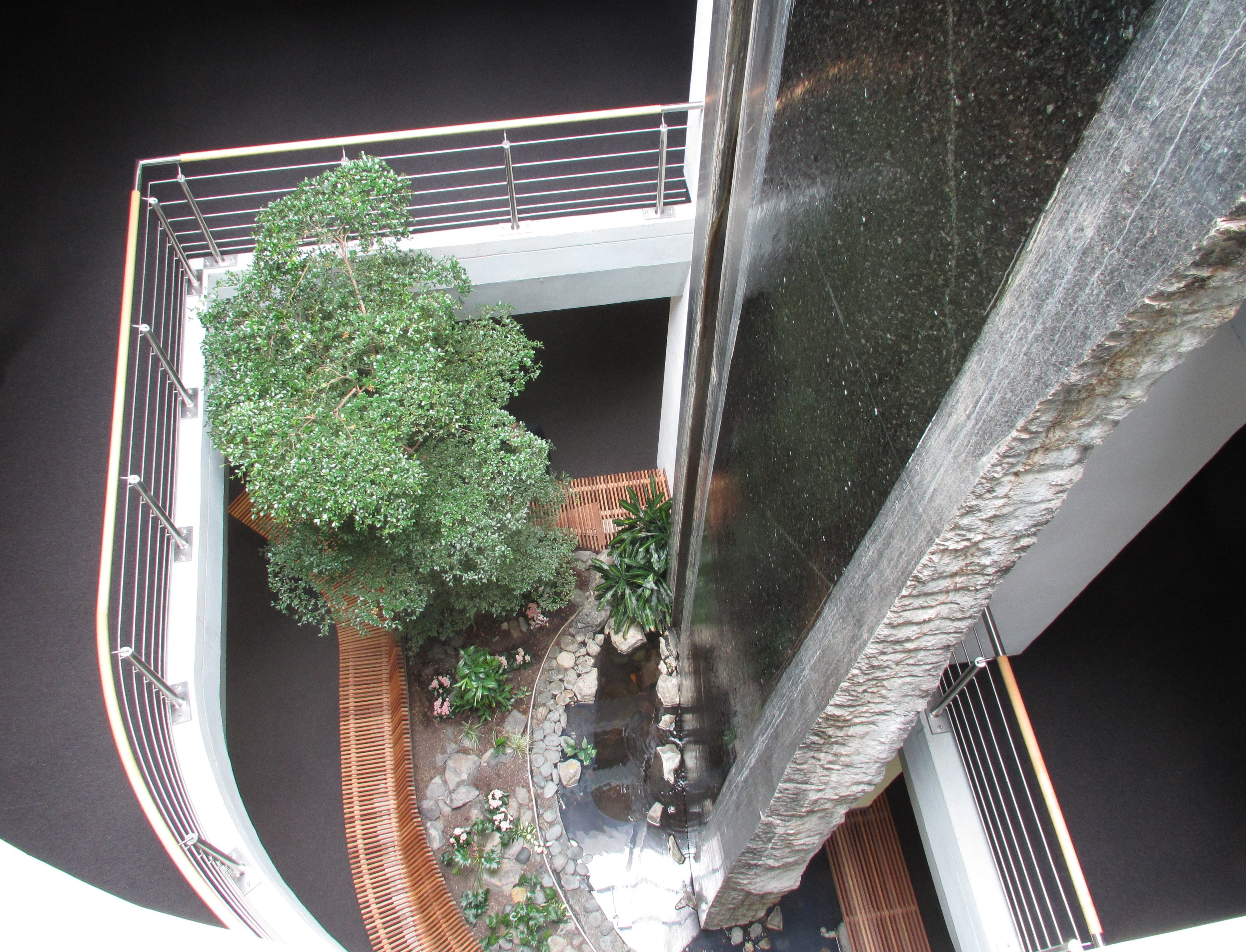 GLS Bank Christstraße 9, 44789 Bochum: Eingangsbereich mit Wasserwand -- Professor Andreas Kienlin -- Fachgebietsleiter Bildhauerei -- Professor im Fachgebiet Bildhauerei -- -- 2005 GLS Bank Bochum: Wasserwand 14 Meter, Stein plus Skulpturen auf dem Bankgelände